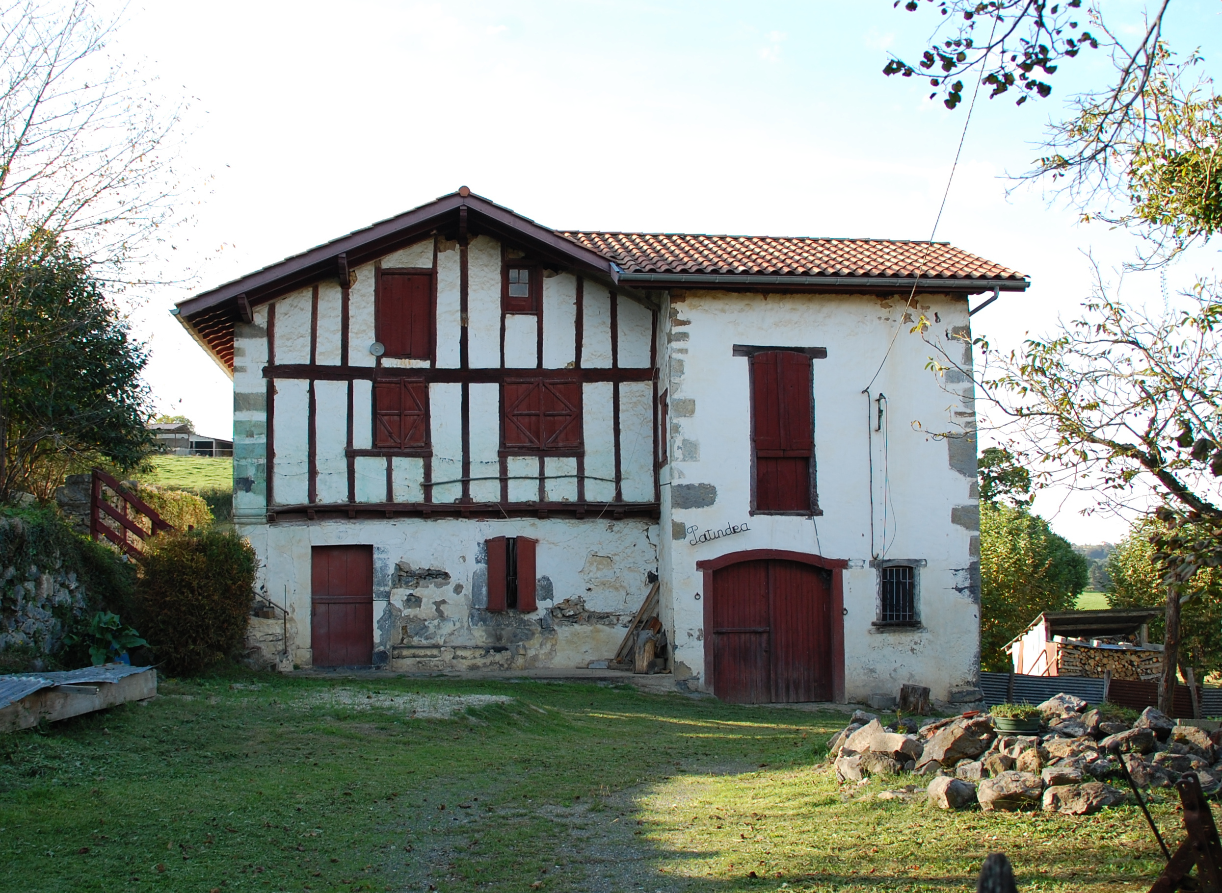 Maison Patindea, Ayherre.